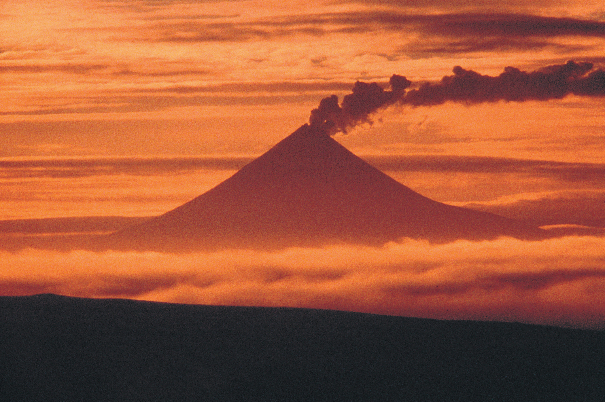 Mount Shishaldin at sunset, Unimak Island, Alaska, USA.